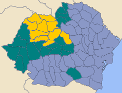 Ortodocșii și greco-catolicii din România interbelică. Ponderea greco-catolicilor o depășește pe cea a ortodocșilor, existând totuși o importantă comunitate ortodoxă Ponderea ortodocșilor o depășește pe cea a greco-catolicilor, existând totuși o importantă comunitate greco-catolică Majoritate ortodoxă fără o prezența greco-catolică semnificativă (sub 1%)